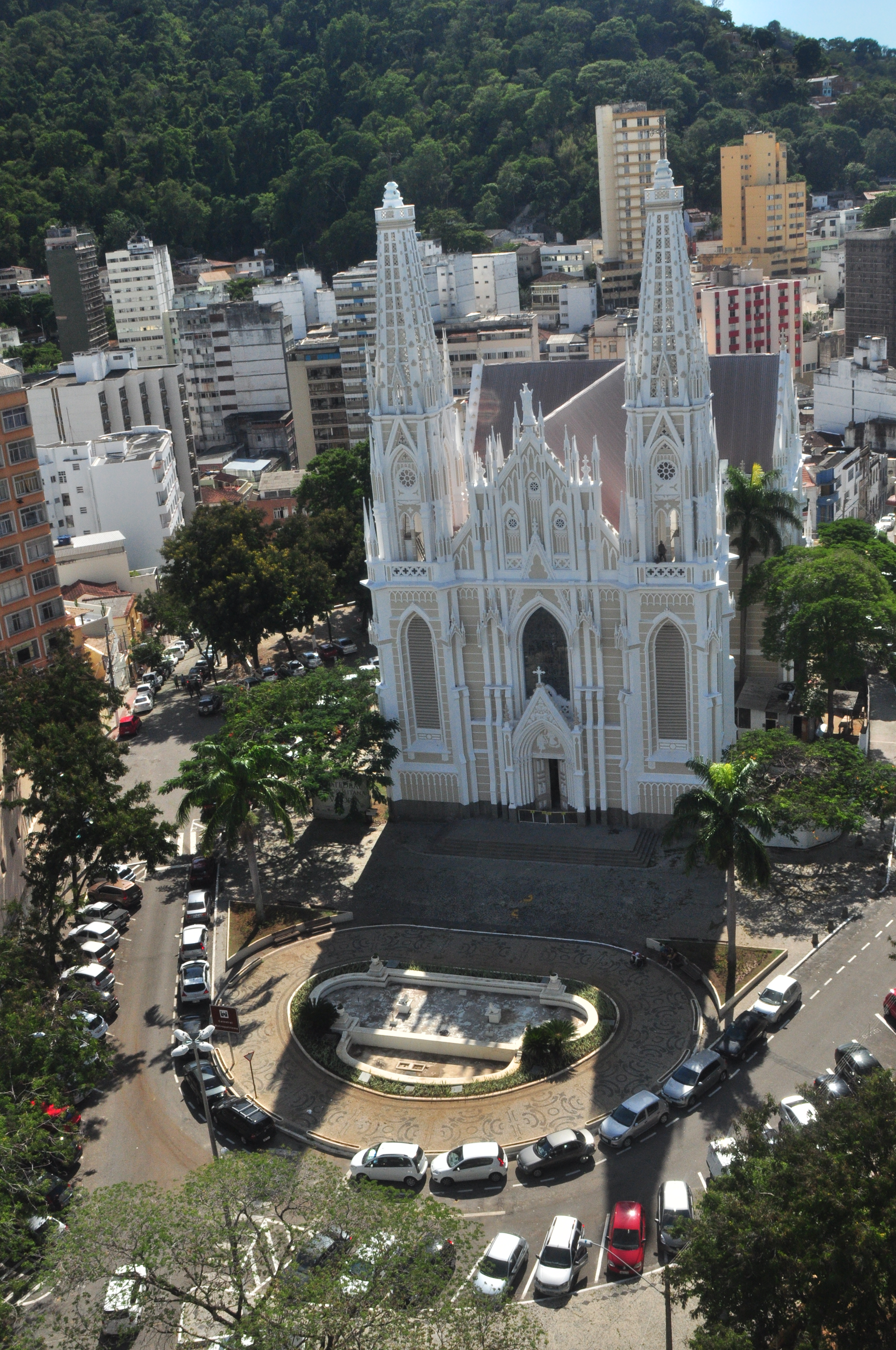 Centro, Vitória - ES, Brazil